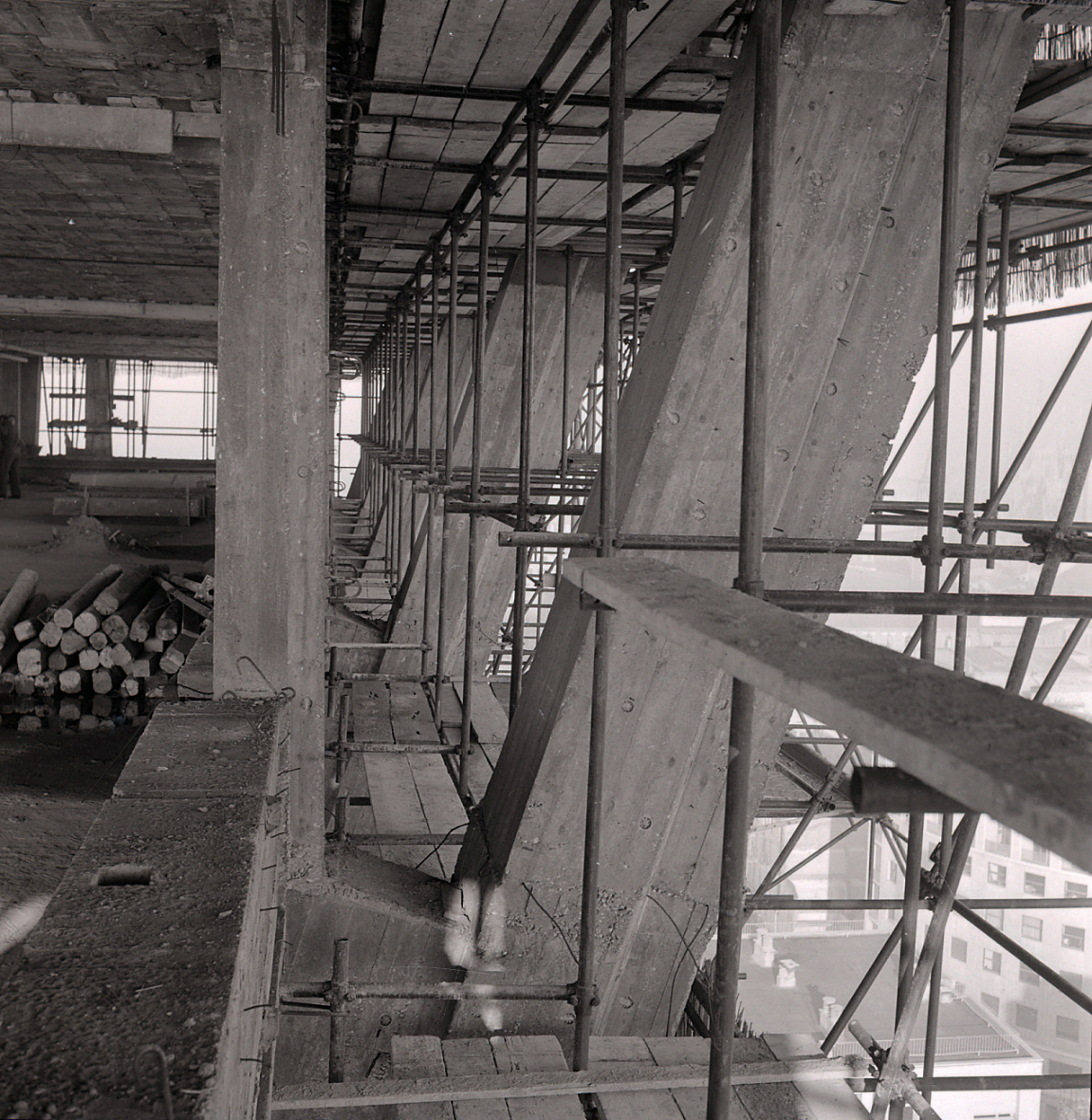 Servizio fotografico : Milano, 1956 / Paolo Monti. - Buste: 1, Fototipi: 6 : Negativo b/n, gelatina bromuro d'argento/ pellicola ; 6x6. - ((Serie costituita da 6 negativi identificati con i nn.: 23900-23905. Sulla busta manoscritto: "Torre Velasca/ Studio arch. BBPR/ Duplicati". La suddetta serie è contenuta nella scatola identificata con la numerazione R23809-24178. Sul coperchio manoscritto a pennarello: "Architetti/ Musei e varie".